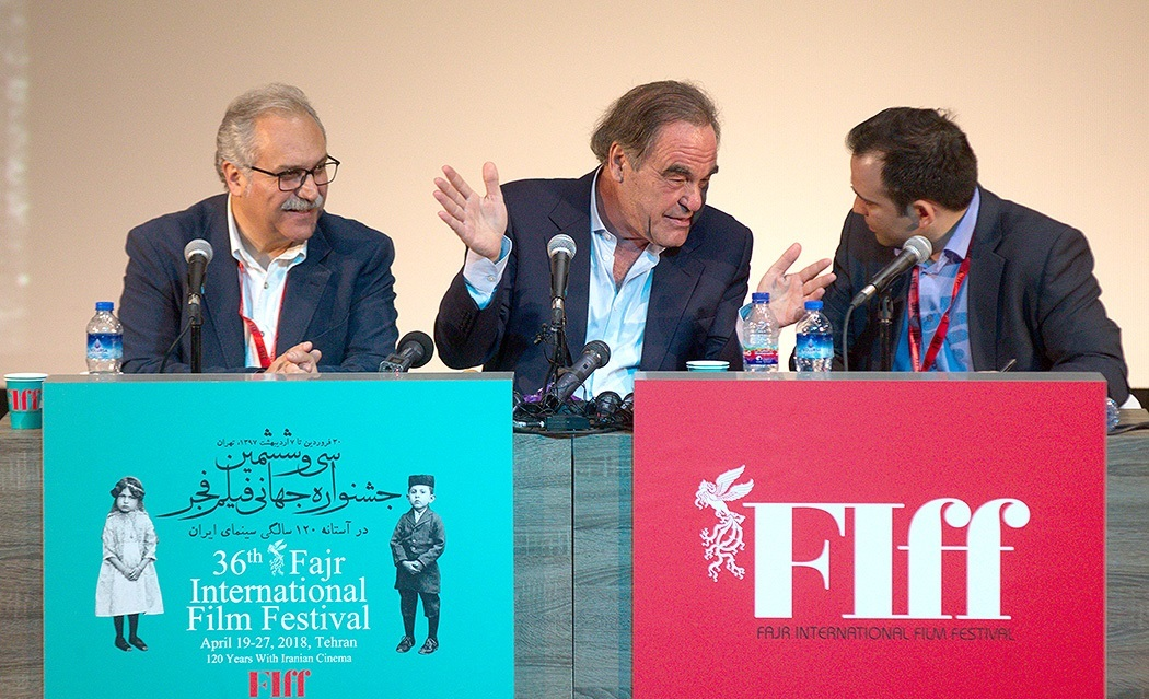 نشست خبری «الیور استون» کارگردان، نویسنده و تهیه‌کننده آمریکایی، صبح امروز چهارشنبه ۵ اردیبهشت ۱۳۹۷ در حاشیه هفتمین روز «سی و ششمین جشنواره جهانی فیلم فجر» در پردیس سینمایی چارسو برگزارشد. وی در این نشست گفت: در طول سالیان کار خودم ۱۰ - ۱۲ تا فیلم ایرانی دیده‌ام و همیشه فیلم‌های ایرانی را تحسین کرده ام. تا الان هم ۱۰ فیلم دیده‌ام و الان با آرامش در هتل هم فیلم تماشا می‌کنم تا با فراغ بال هم با فیلمهای ایرانی و هم با فیلمهای آسیایی بیشتر آشنا شوم. الیور استون فیلمسازی است که در کارنامه کاری اش آثاری درباره رؤسای جمهوری آمریکا و سایر کشورها به چشم می خورد؛ آثاری چون «جی اف کی» درباره جان اف کندی،«نیکلسون» و «دبلیو» درباره جرج دبلیو بوش،«فرمانده» درباره فیدل کاسترو رئیس جمهور کوبا، «جنوب مرز» درباره هوگو چاوز رئیس جمهور ونزوئلا. وی همچنین مستند های جنجالی «مرکز تجارت جهانی» را درباره واقعه ۱۱ سپتامبر و انهدام برجهای دوقلو ساخت و با مستند «تاریخ ناگفته آمریکا» به گفته خودش سعی کرد نسخه ای حقیقی از تاریخ کشورش را بازگو کند.